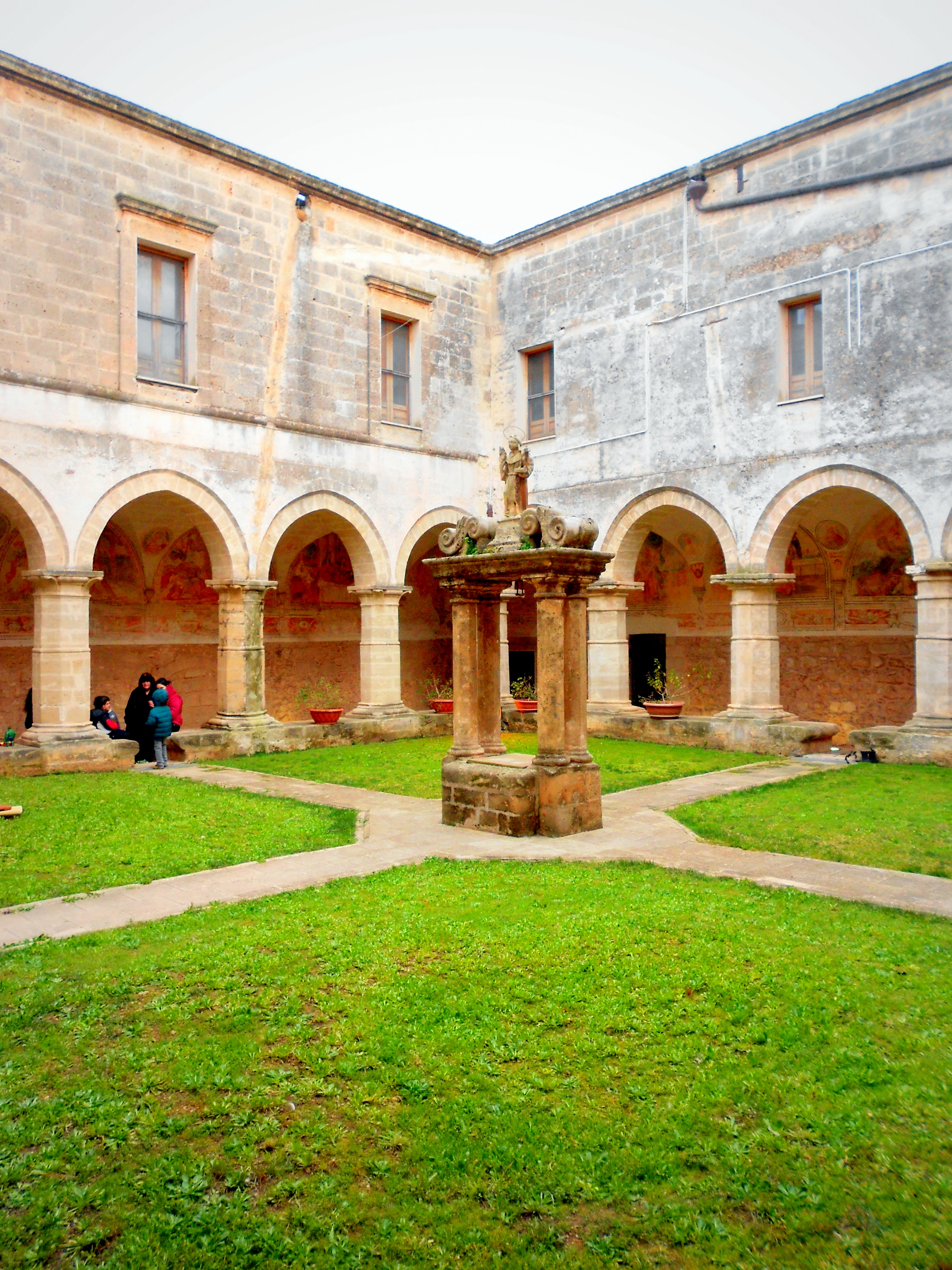 Il chiostro del convento di Maruggio